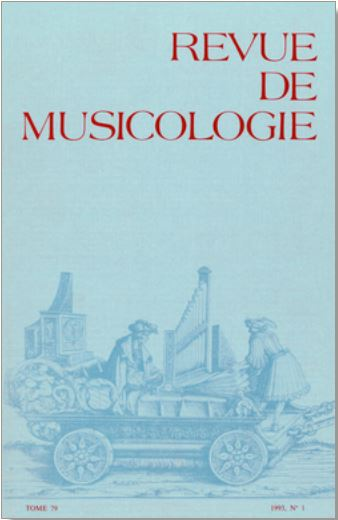 Couverture de la Revue de Musicologie, 1979-2008, d'après le Triomphe de Maximilien de Hans Burgkmair.